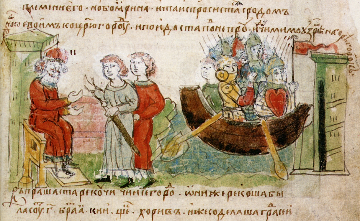 Радзивилловская летопись, л. 9r, детайл. Миниатюра: Аскольд и Дир, просящие у Рюрика в Новгороде резрешения на поход в Царыград; прибытие Асколда и Дира на кораблях с дружиной к Киеву. Слева подпис к рисунку: Новгород. Tекст из Радзивиловской летописи: "... и тъми вьсъми обладаше Рюрикъ. И бяста у него 2 мужа не племени его, но боярина, и та испросистася с родомъ своимъ ко Царюгороду, и поидоста по Днепру, идучи мимо, узреша на горе городок. ..." Литература: Кукушкина: Радзивиловская летопись. Текст. Исследование. Описание миниатюр, стр. 306